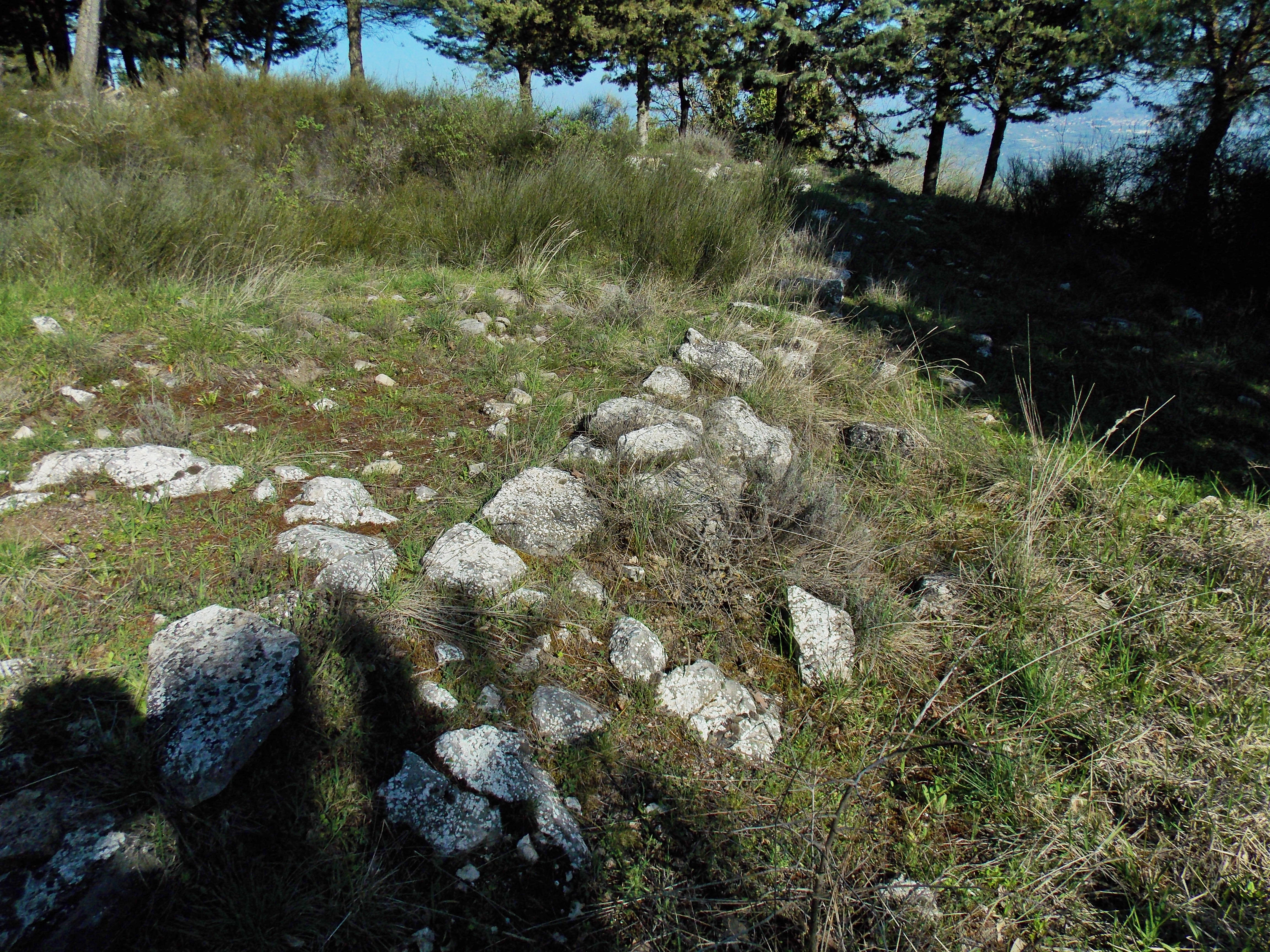 L'area archeologica di Monte Chiodo a Buonalbergo, in provincia di Benevento: muro di un edificio quadrangolare